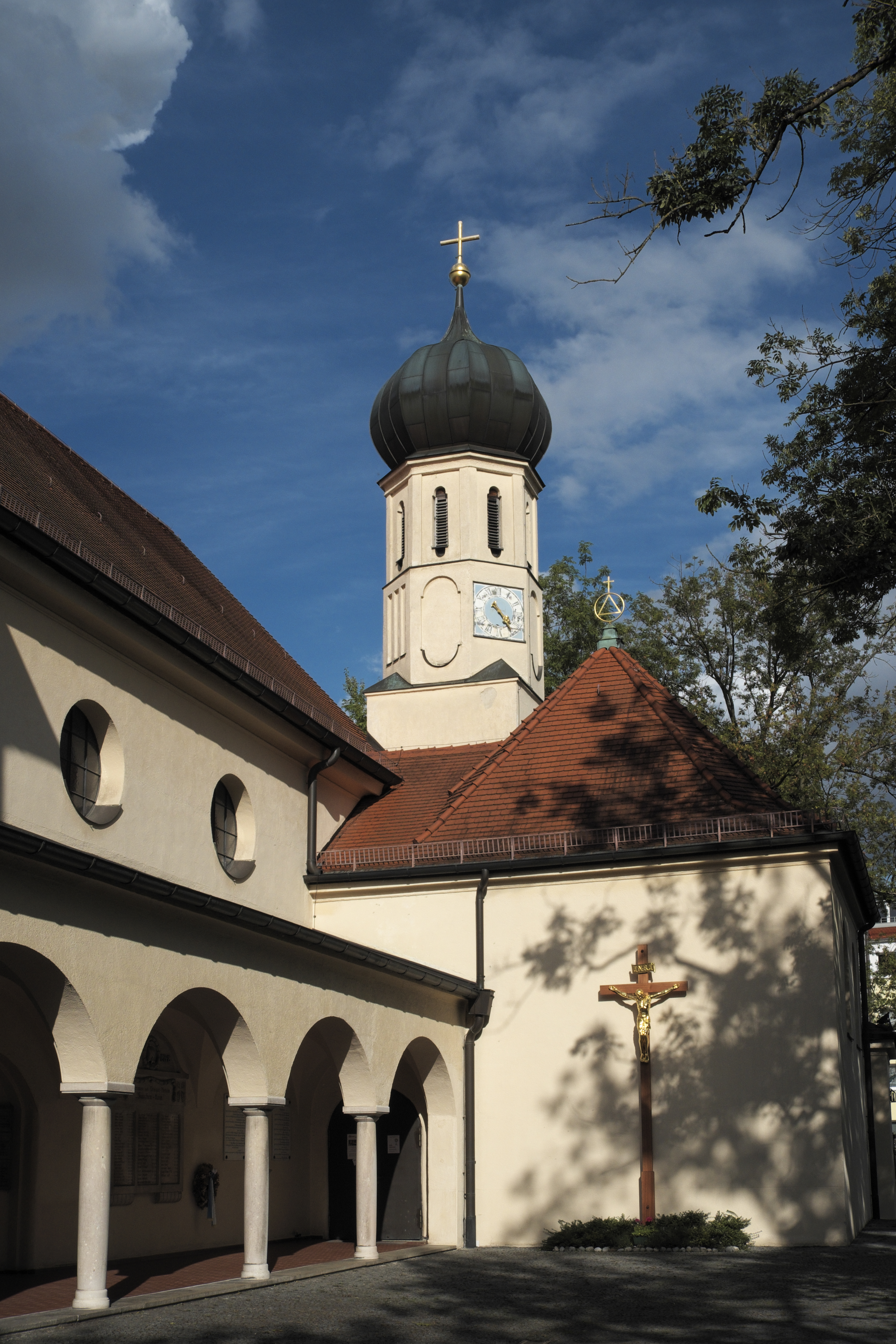 Katholische Pfarrkirche St. Ulrich in der Agnes-Bernauer-Straße 104 im Stadtbezirk Laim in München (Bayern/Deutschland), 1912/14 Erweiterung der spätgotischen Dorfkirche durch Friedrich von Schmidt